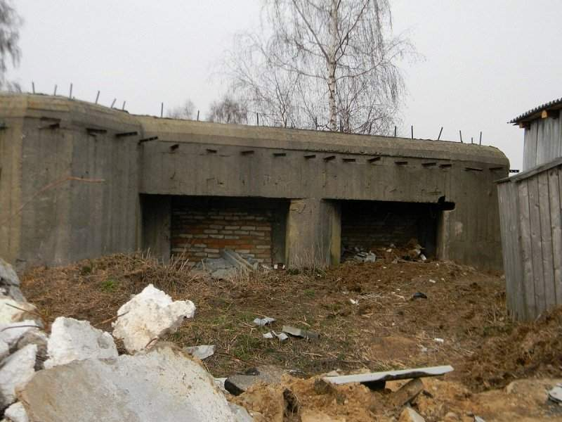 Вялікая Раёўка. Фартыфікацыйныя збудаванні